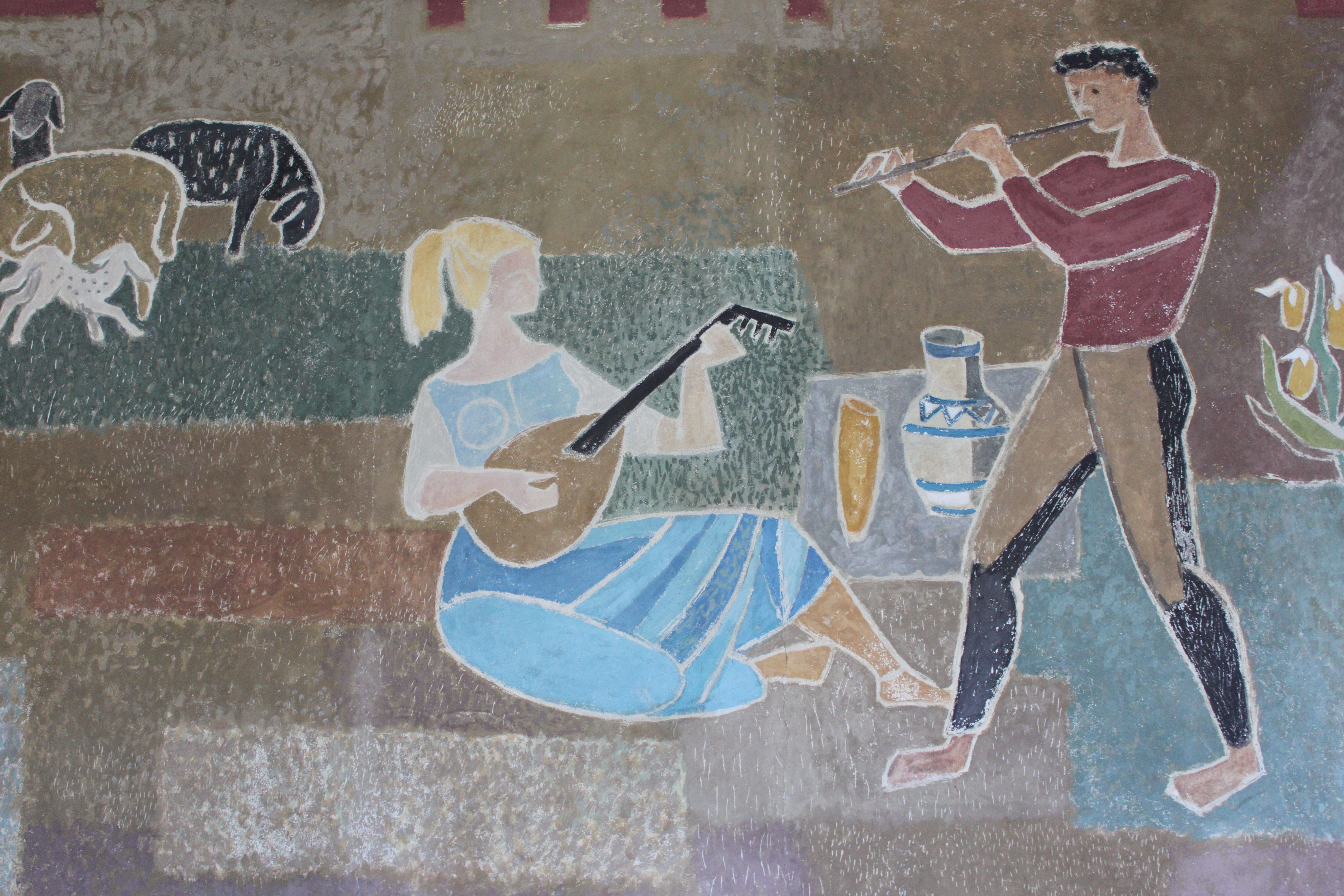 Detailausschnitt Fresko von Leopold Fetz in der Bergstation der Karrenseilbahn, dem Andenken von Viktor Hämmerle gewidmet, von der Stadt Dornbirn